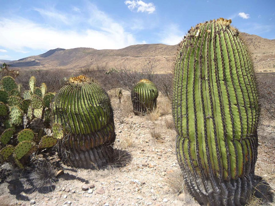 Fué nombrado una de Las 50 Maravillas de Guanajuato en 2012 por el dolorense Emmanuel Pérez Balderas.